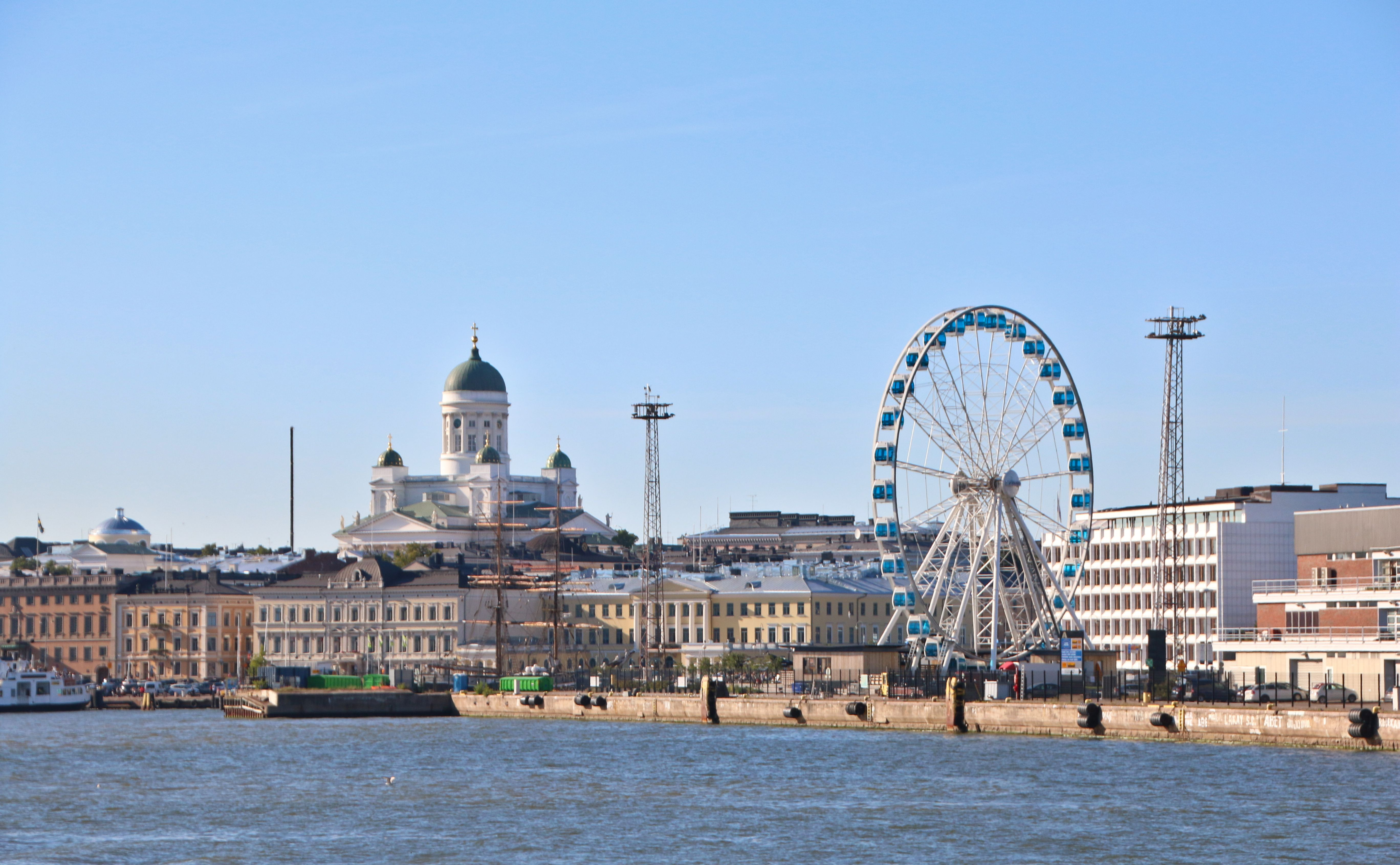 Helsinki, Finland